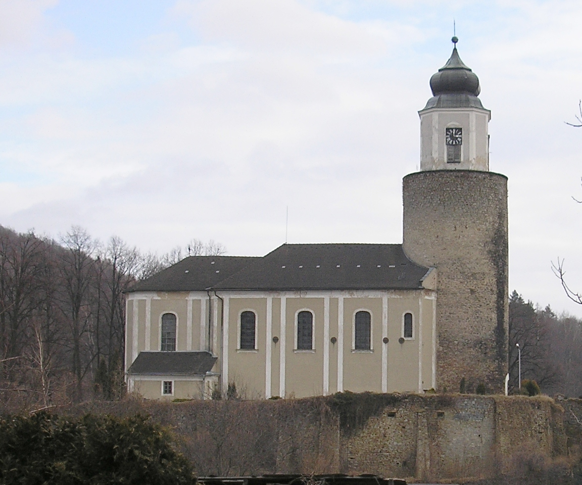 Žulová - Frýdberk, bergfrit, kostel